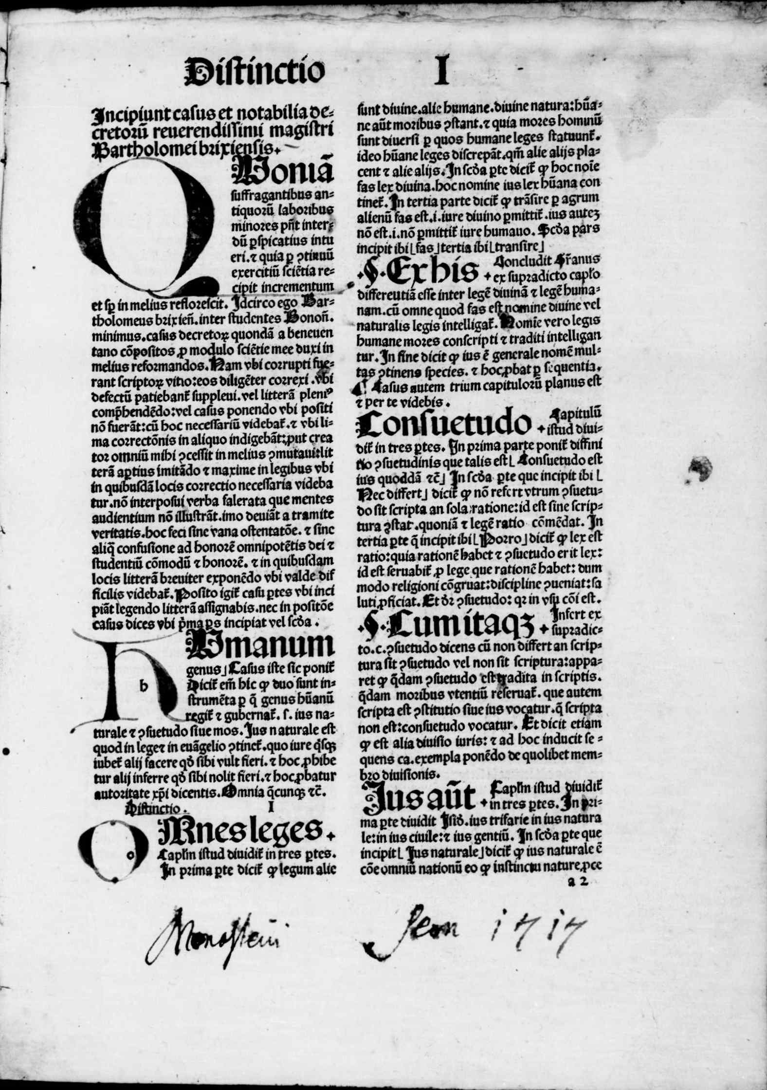 Frontespizio